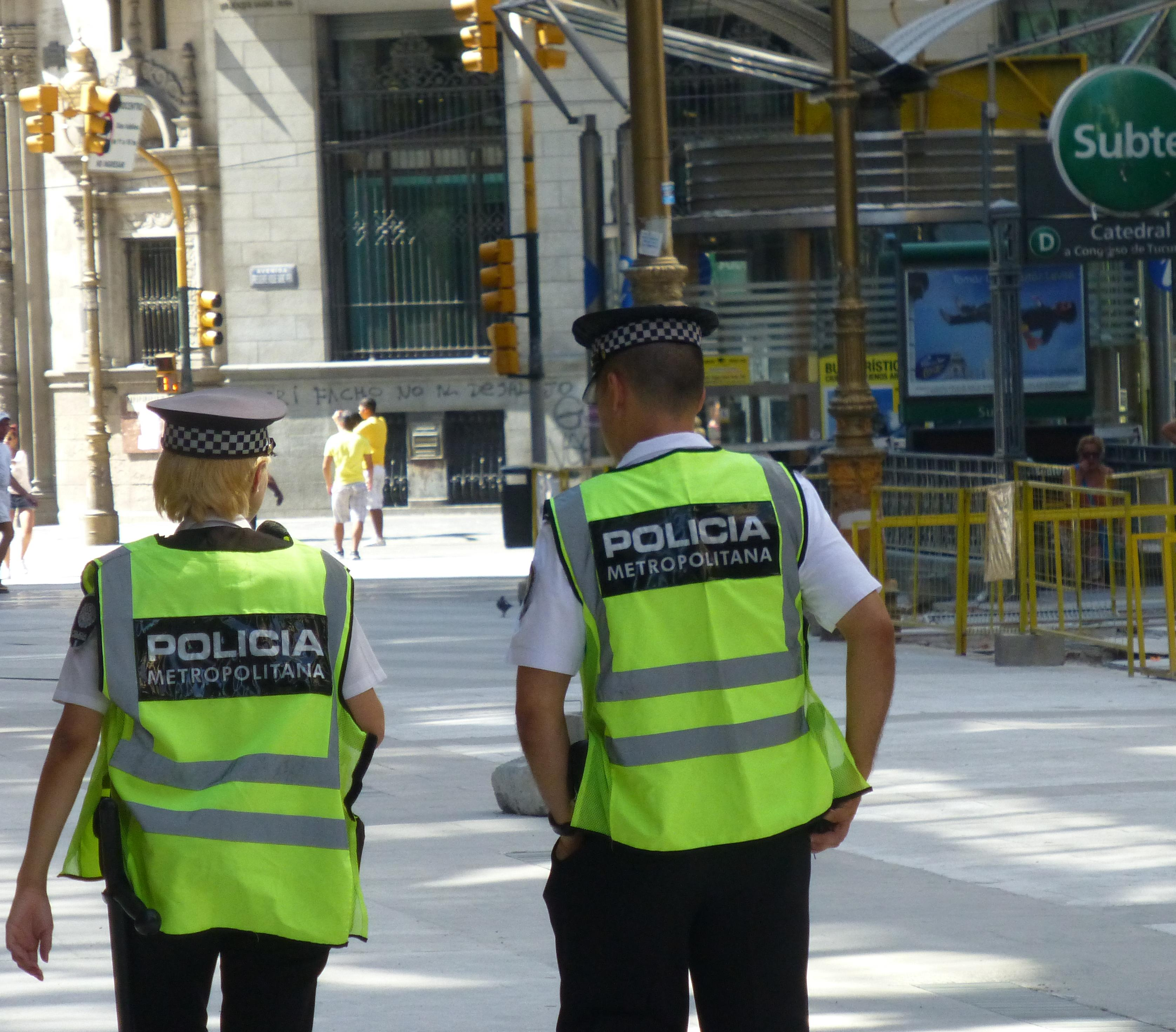 Dos agentes de la Policía Metropolitana de la Ciudad Autónoma de Buenos Aires realizando tareas de prevención.